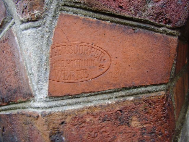 Stempel cegielni funkcjonującej w Zebrzydowej